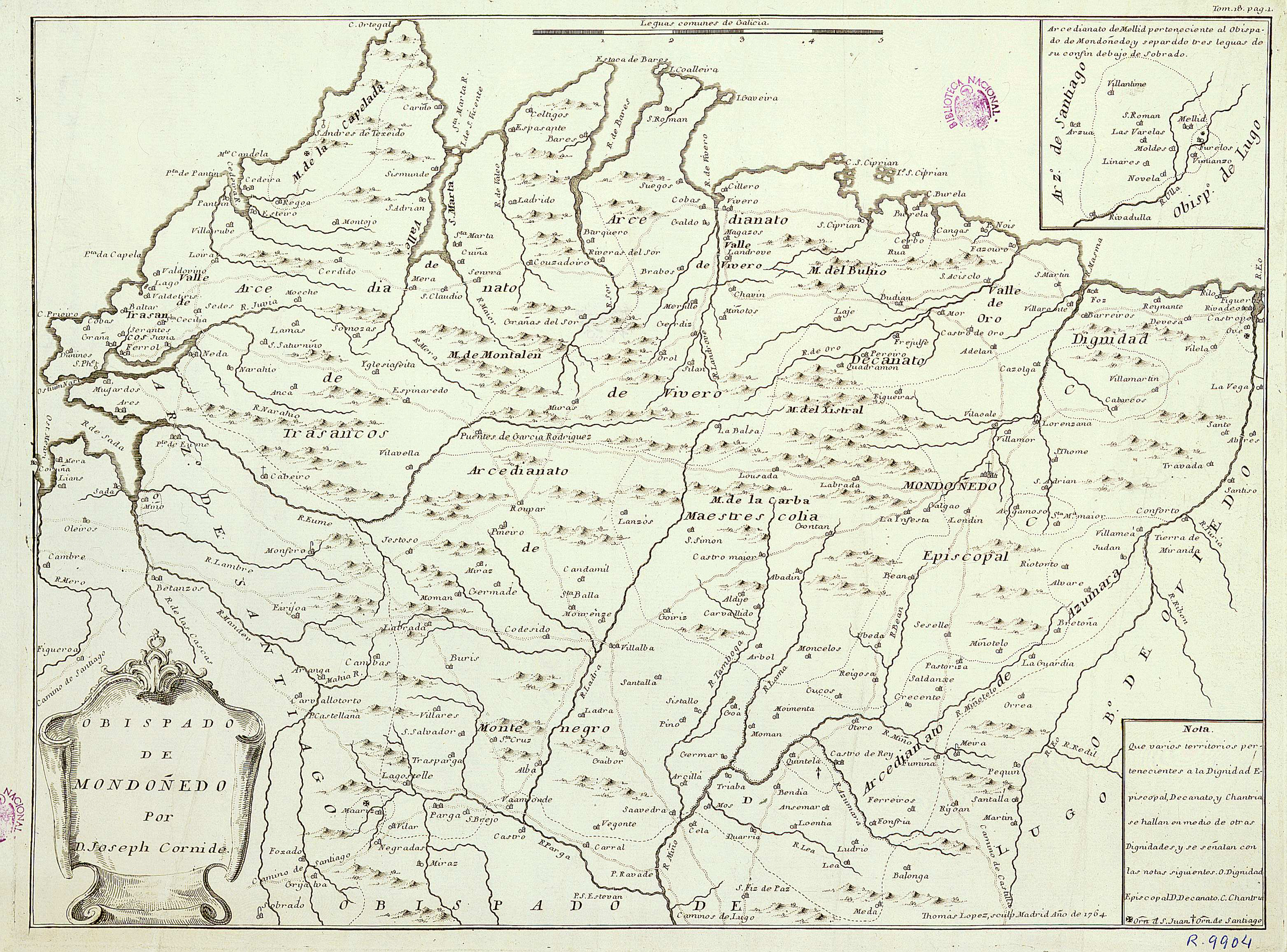 Mapa do bispado de Mondoñedo de Joseph Cornide.